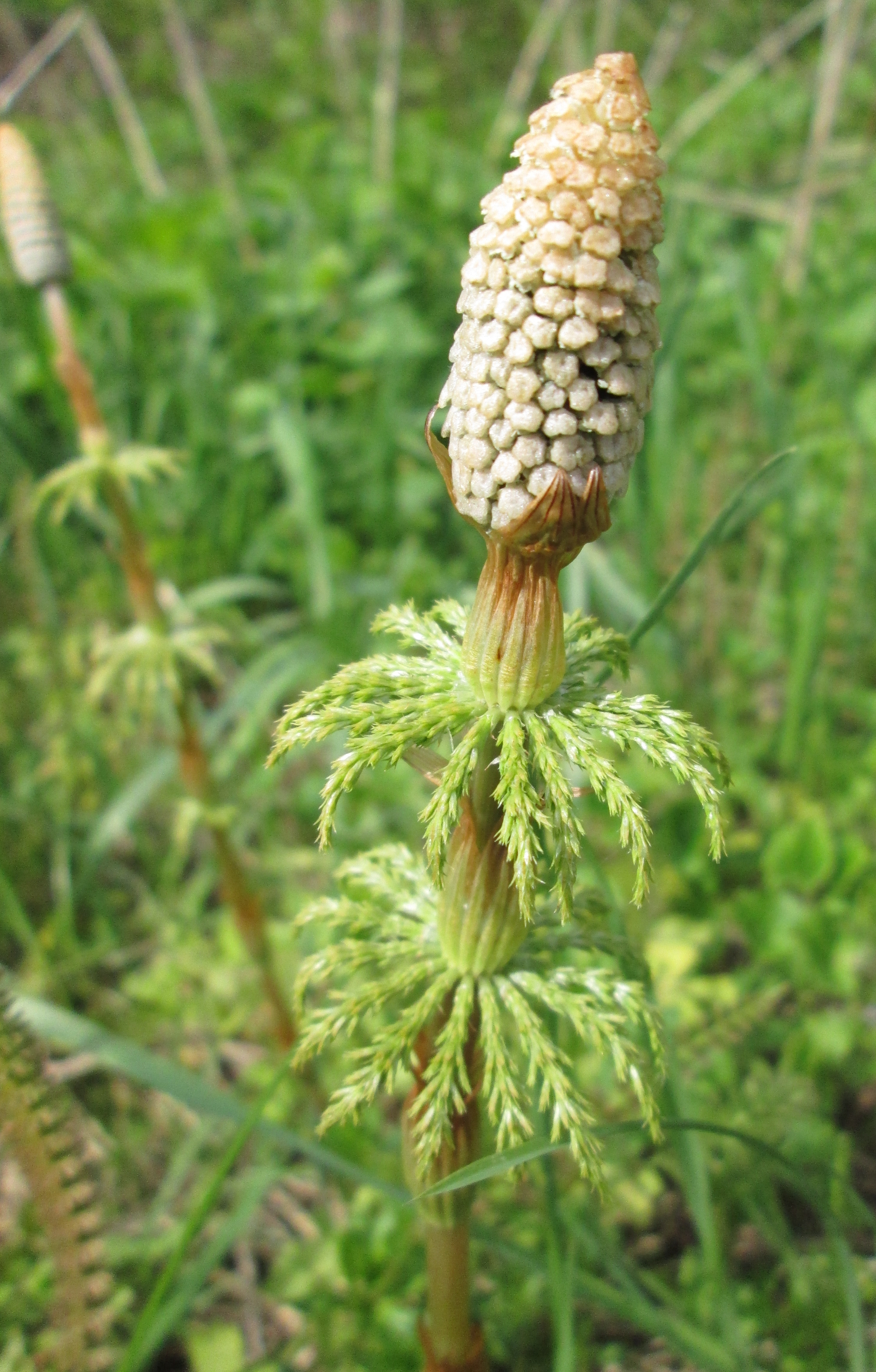 Хвощ лесной (Equisetum sylvaticum)